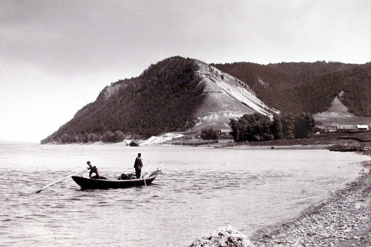 Вид на Лысую гору у села Моркваши, Жигулёвские горы, Самарская Лука, Россия